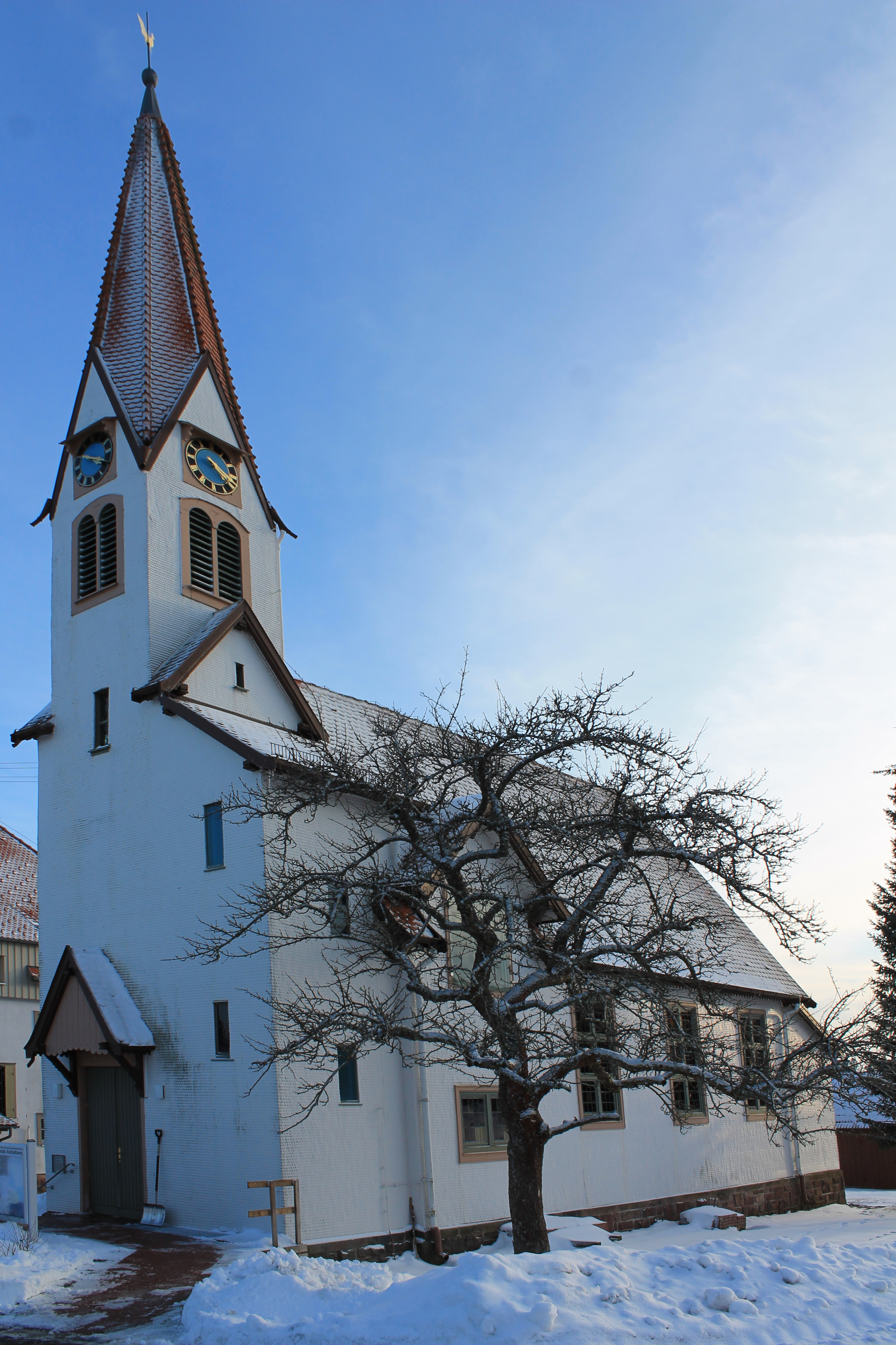 Jugendstilkirche von Aichelberg / Iglesia de Aichelberg / Church of Aichelberg